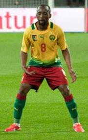 Віллі Овертом — камерунський футболіст, півзахисник